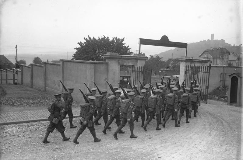 Beginn der Rheinlandräumung durch die Engländer ! Erste Aufnahmen von der Befreiung der deutschen Stadt Königstein i./Taunus von englischer Besatzung. Abziehende englische Besatzungstruppen in der deutschen Stadt Königstein.